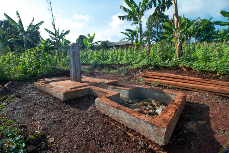 Point d'eau potable de Bametsa par Bamougong.